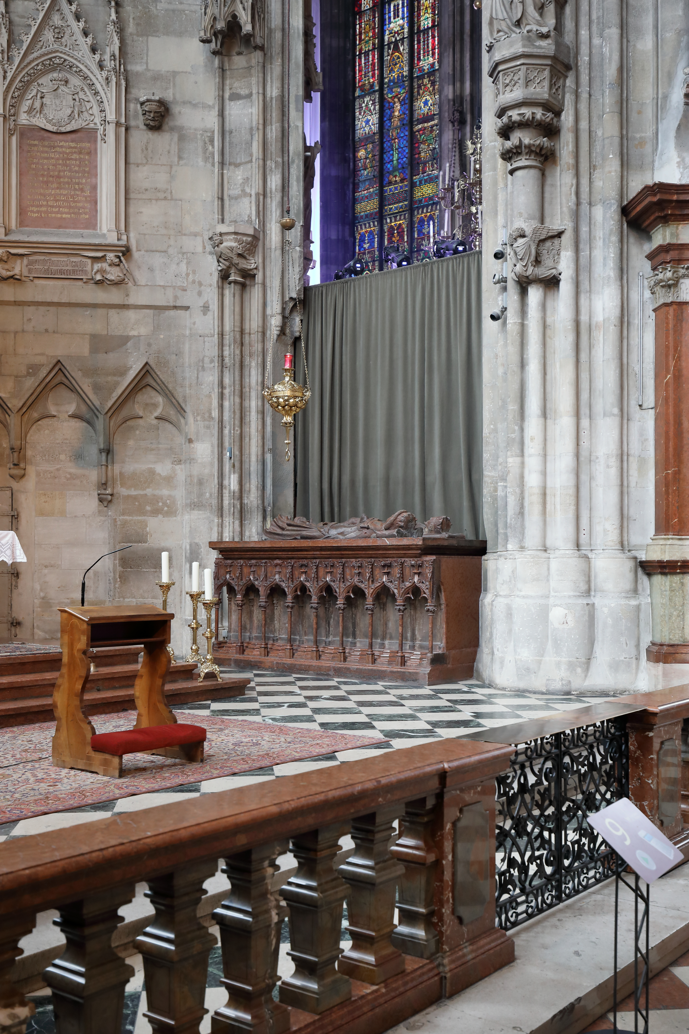 Das Kenotaph Rudolfs IV. und seiner Frau des Stephansdomes in der österreichischen Bundeshauptstadt Wien.Ursprünglich stand das um 1360 geschaffene Grabdenkmal im Mittelchor, am Abgang zur Herzogsgruft. Aktuell befindet es sich rechtsseitig im Chor des linken Seitenschiffes, das auch als Frauchenschiff bzw. Nordschiff bezeichnet wird.